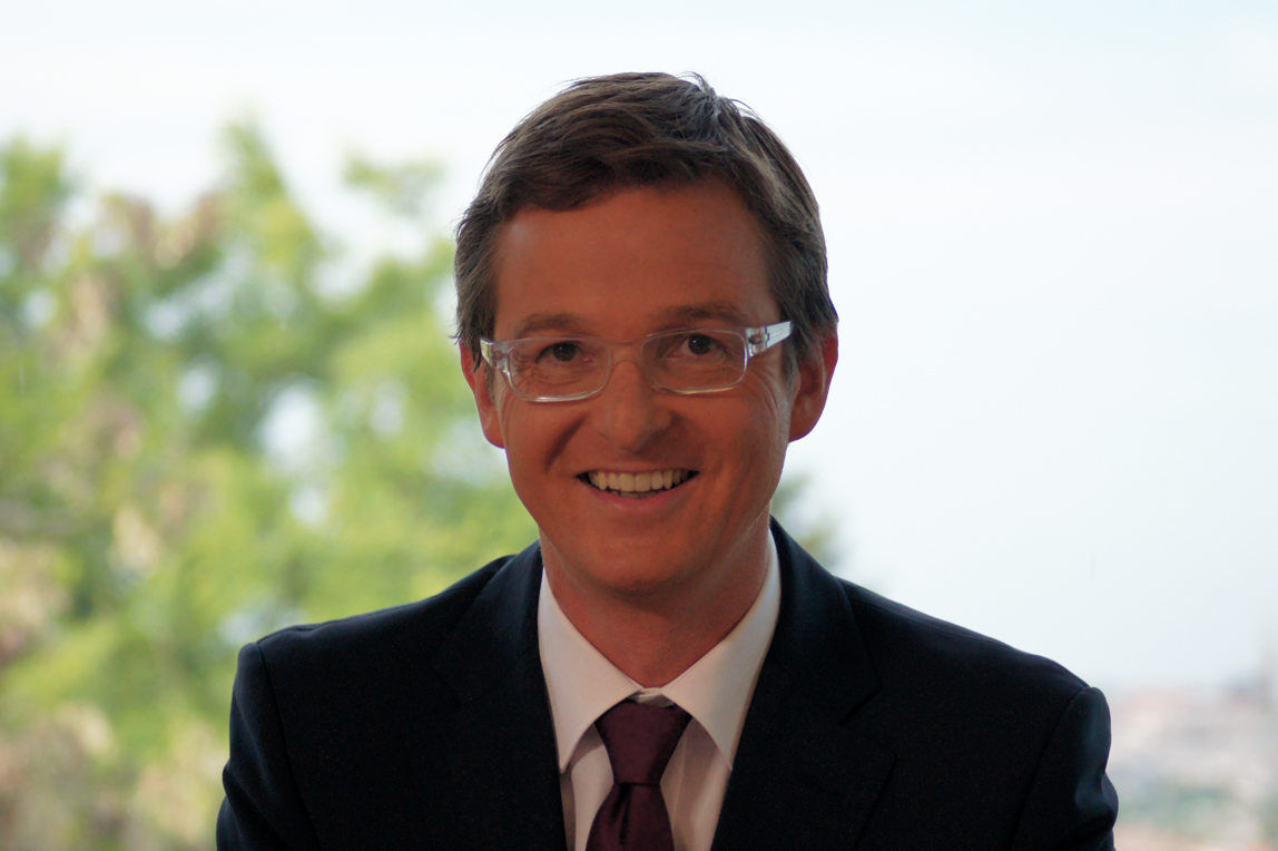 ORF-Moderator Matthias Euba